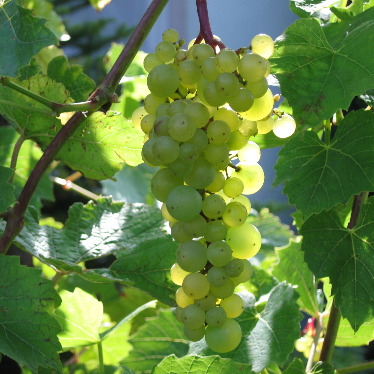 Aurora - grono 2009